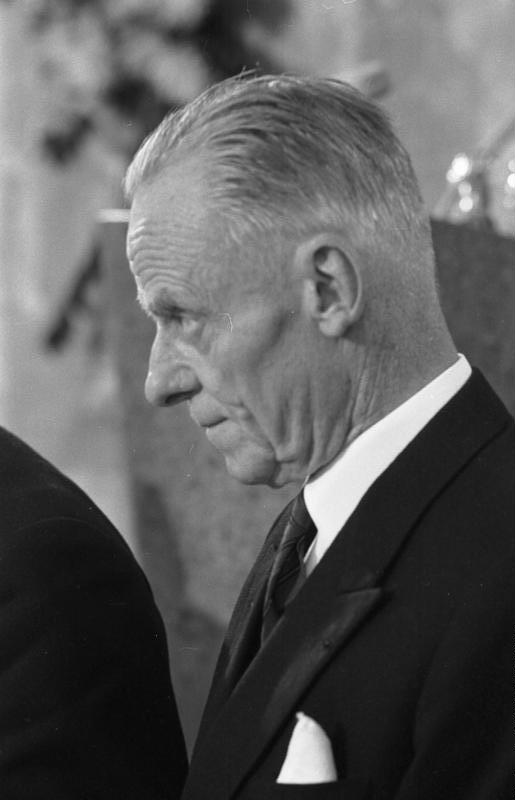 Verleihung des Friedenspreises des deutschen Buchhandels an Kardinal Bea u. [Willem A.] Visser't Hooft in der Paulskirche